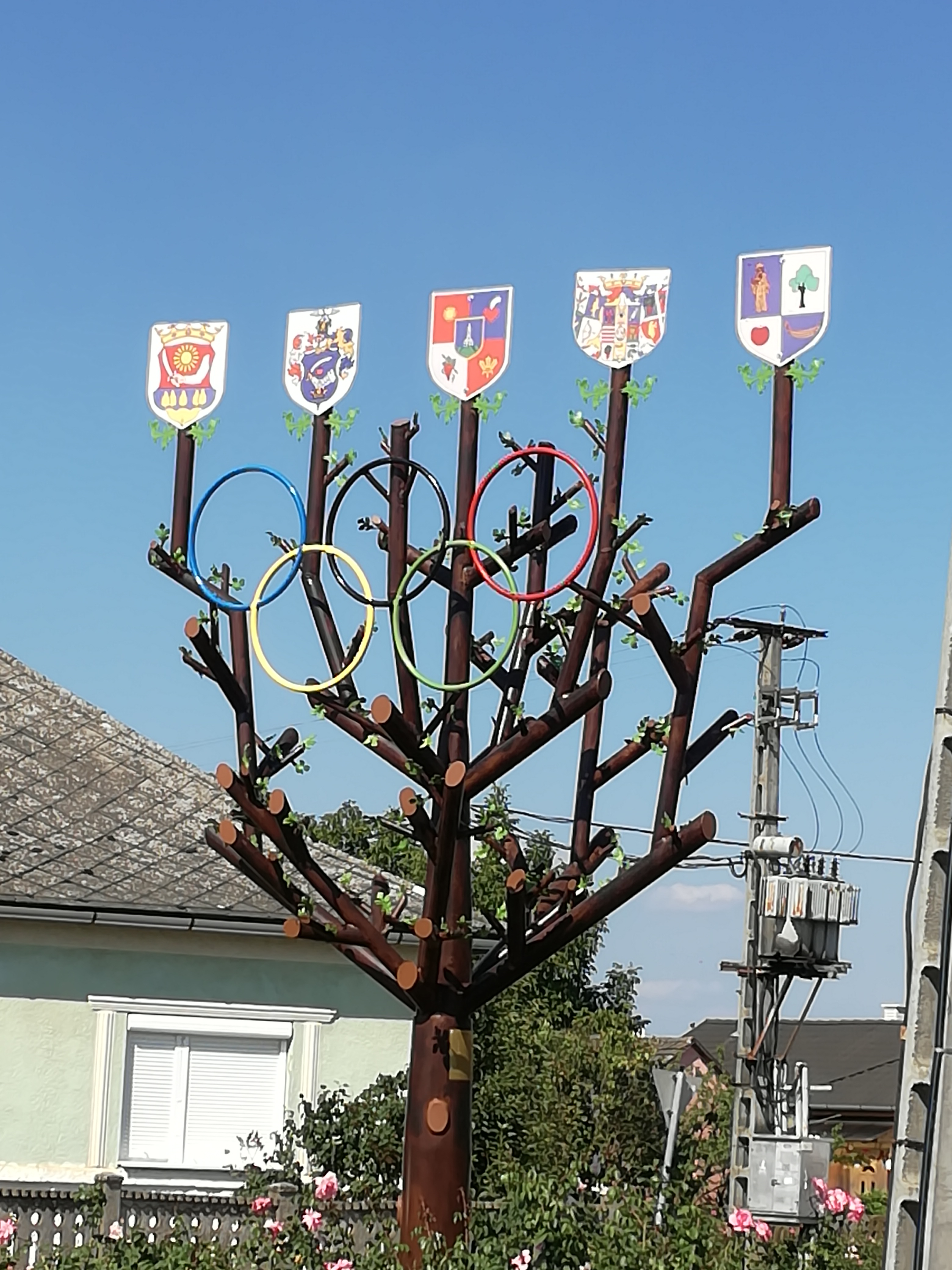 A papi olimpia fa